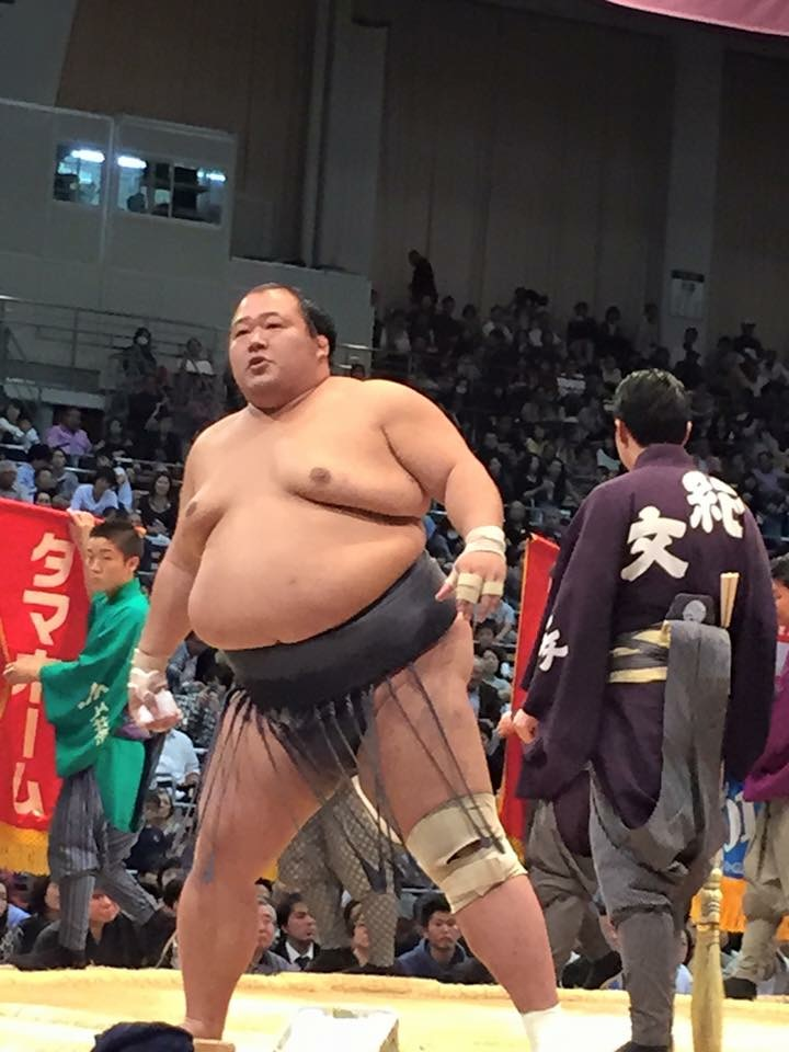 本場所での豊ノ島関